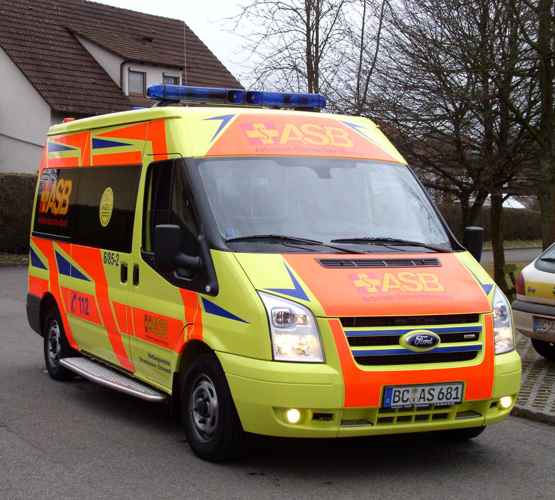 Ford Transit KTW Sama Biberach 6/85-2 des ASB Orsenhausen-Schwendi